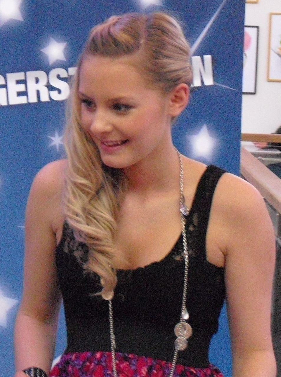 Svenska sångerskan Erika Selin under en signering i Norrköping.